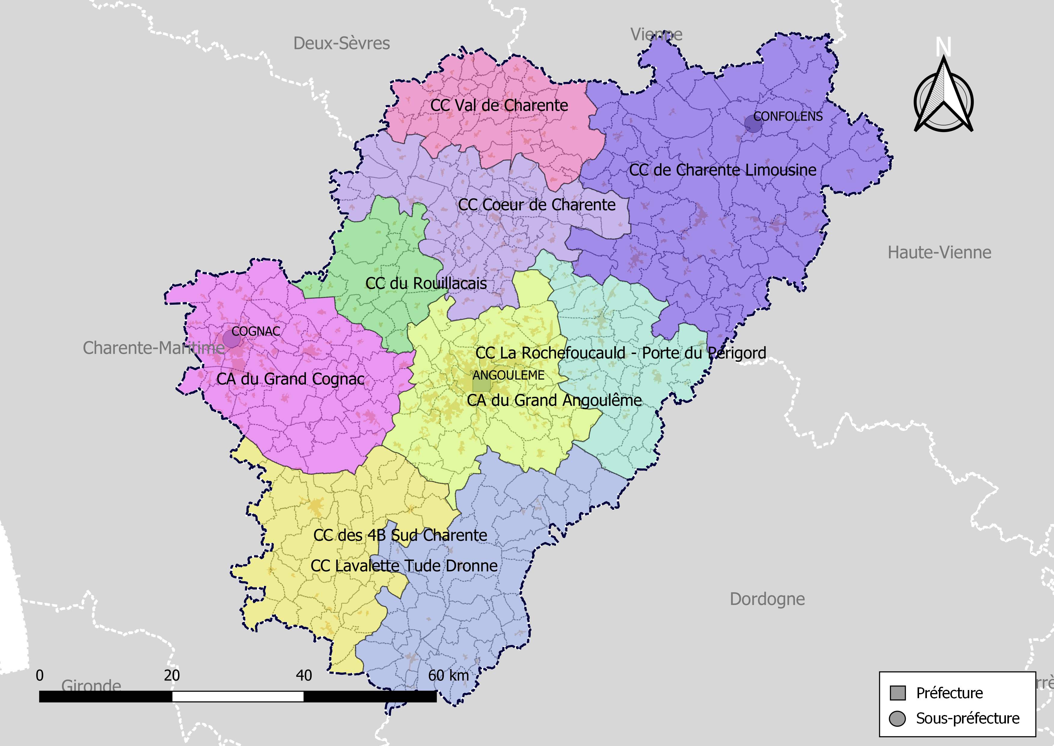 Carte des intercommunalités du département de la Charente, France. Composition au 1er janvier 2019